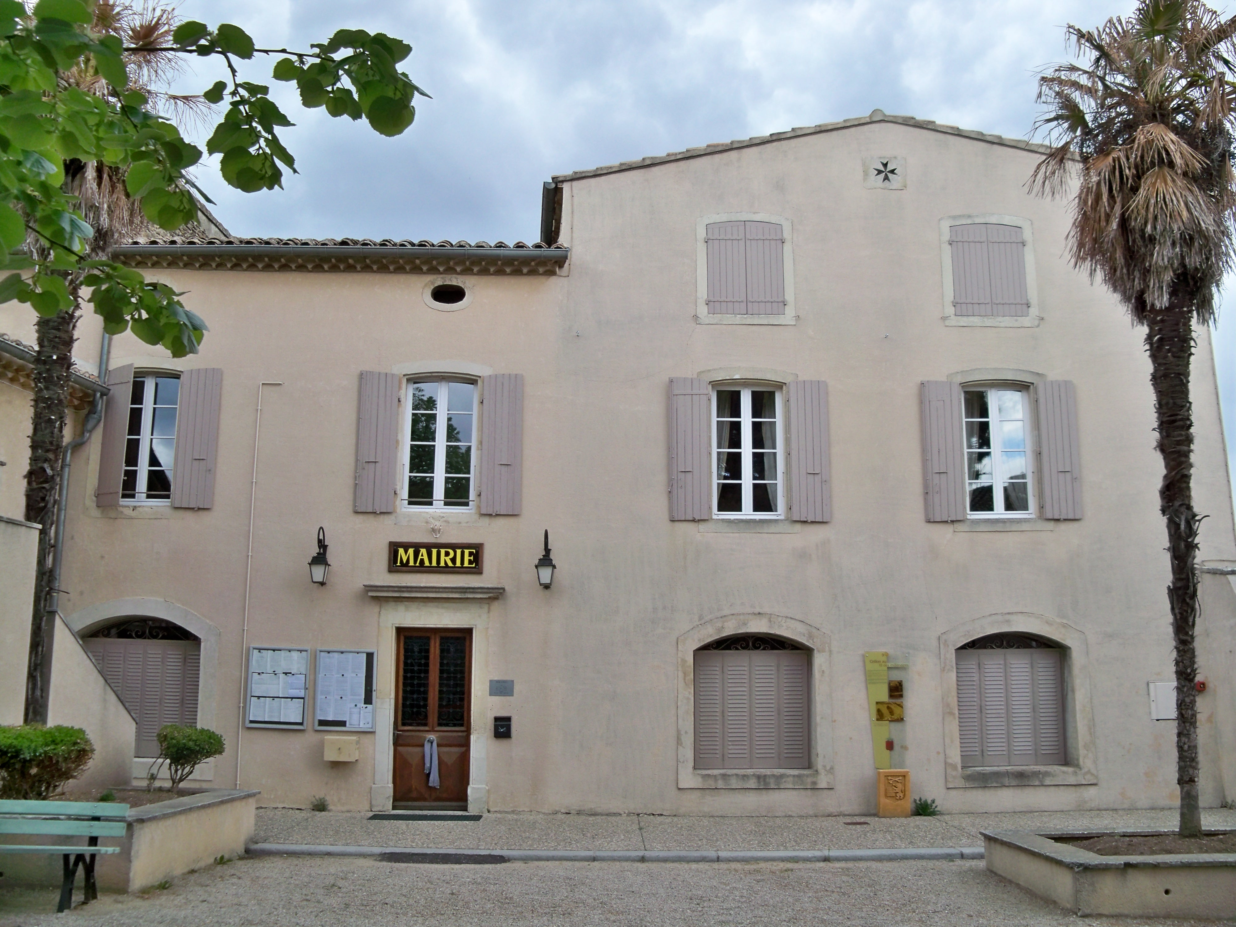 Mairie de Grillon (84)